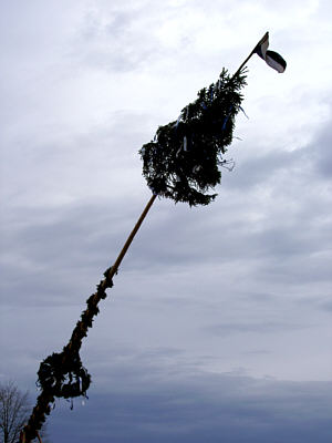 Maibaum in Wernersreuth Copyright Status: GNU Freie Dokumentationslizenz